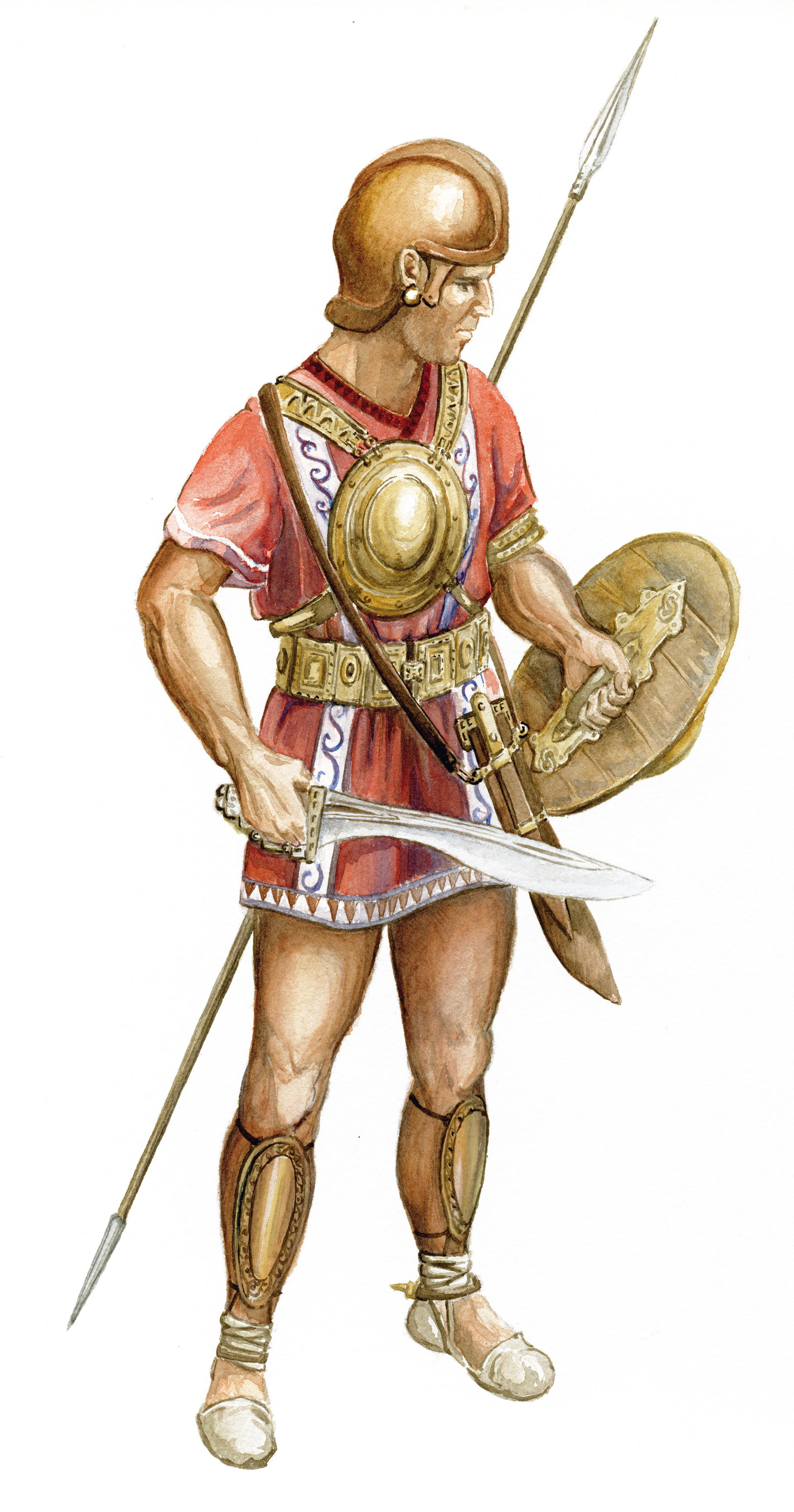 Reconstrucció d'un Guerrer íber (segles V-IV a.C) Il·lustració de F. Chiner.